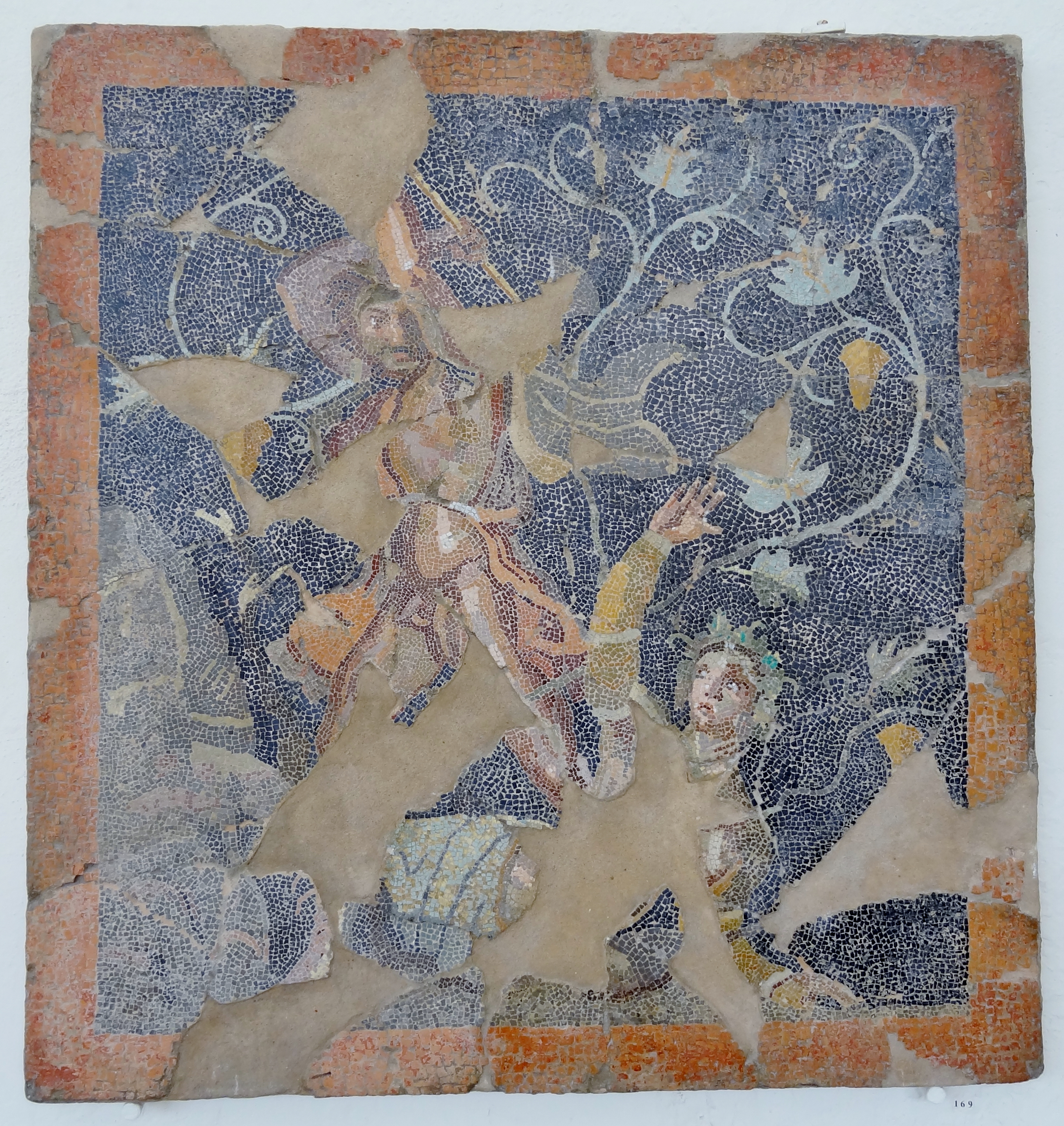 Mosaik im Museum von Delos, Kykladen, Griechenland